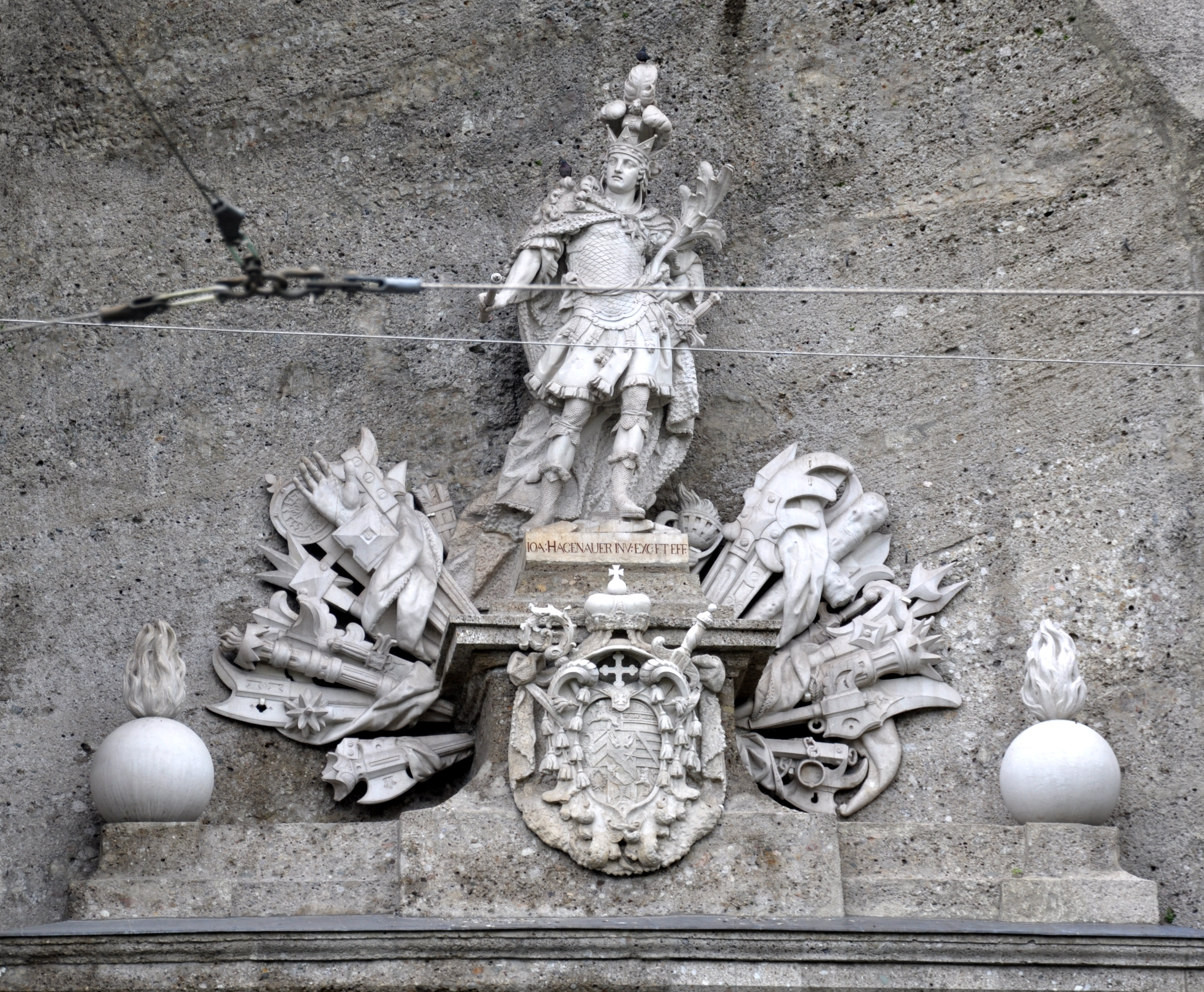 Salzburg, Sigmundstor (Neutor), Westportal (Feldseite), Detail